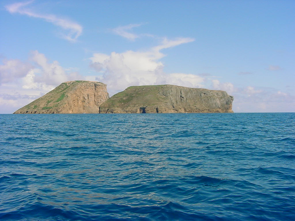 Ilhéus das Cabras, vistos do Mar, ilha Terceira, Açores, Portugal.